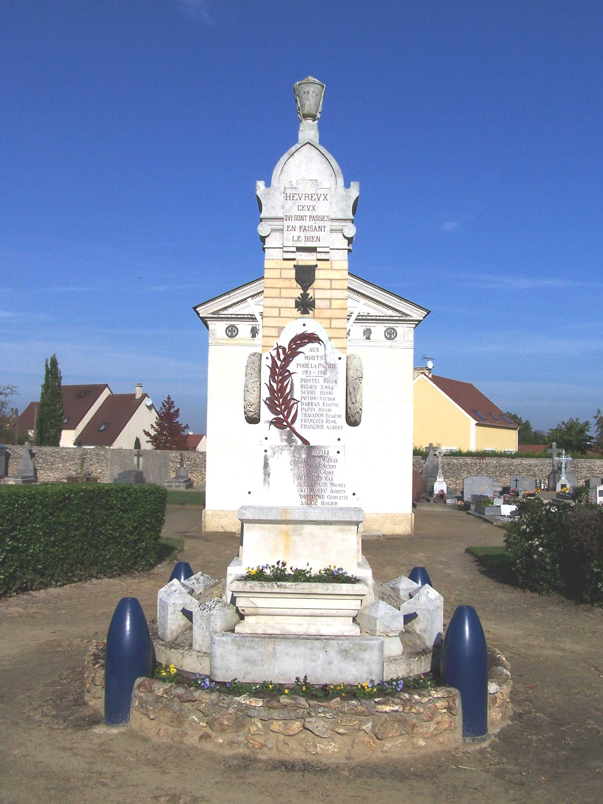 Monument aux morts de Galluis (Yvelines, France)